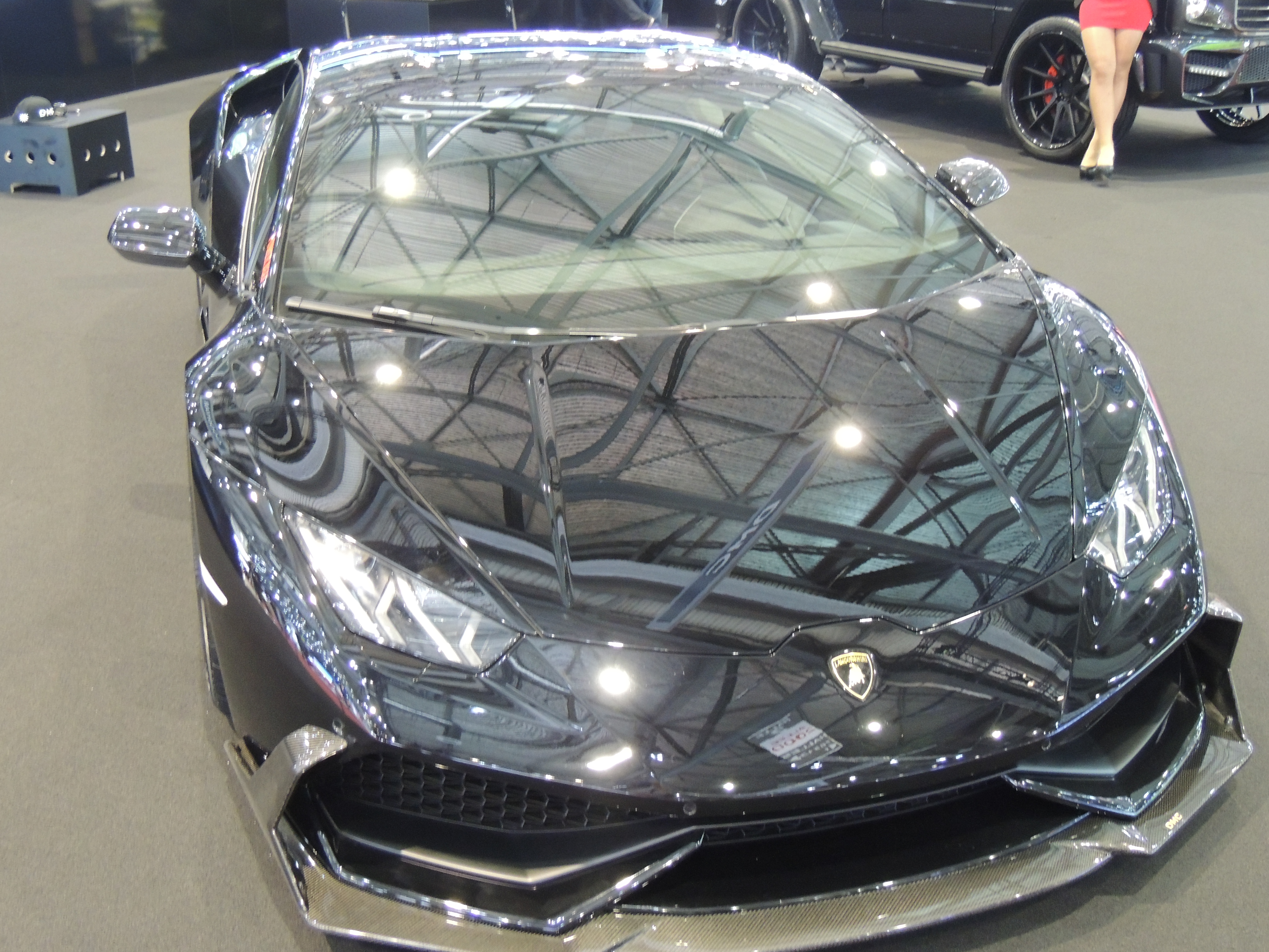 DMC Huracan "Jeddah Edition", salon de Genève 2016